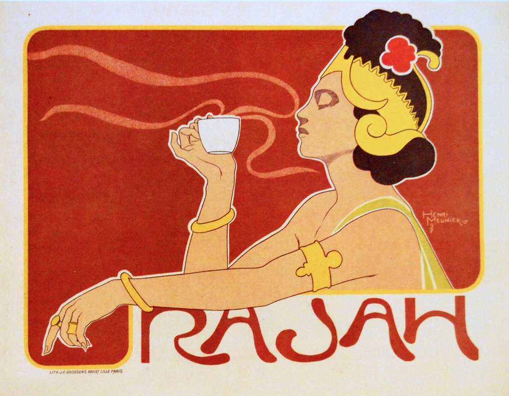 Affiche: Anuncio para Cafés Rajah. Henri Meunier, 1897.